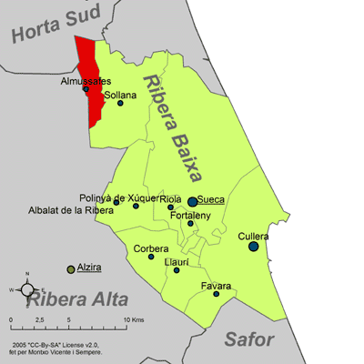 Localización de Almusafes respecto a la comarca de la Ribera Baja